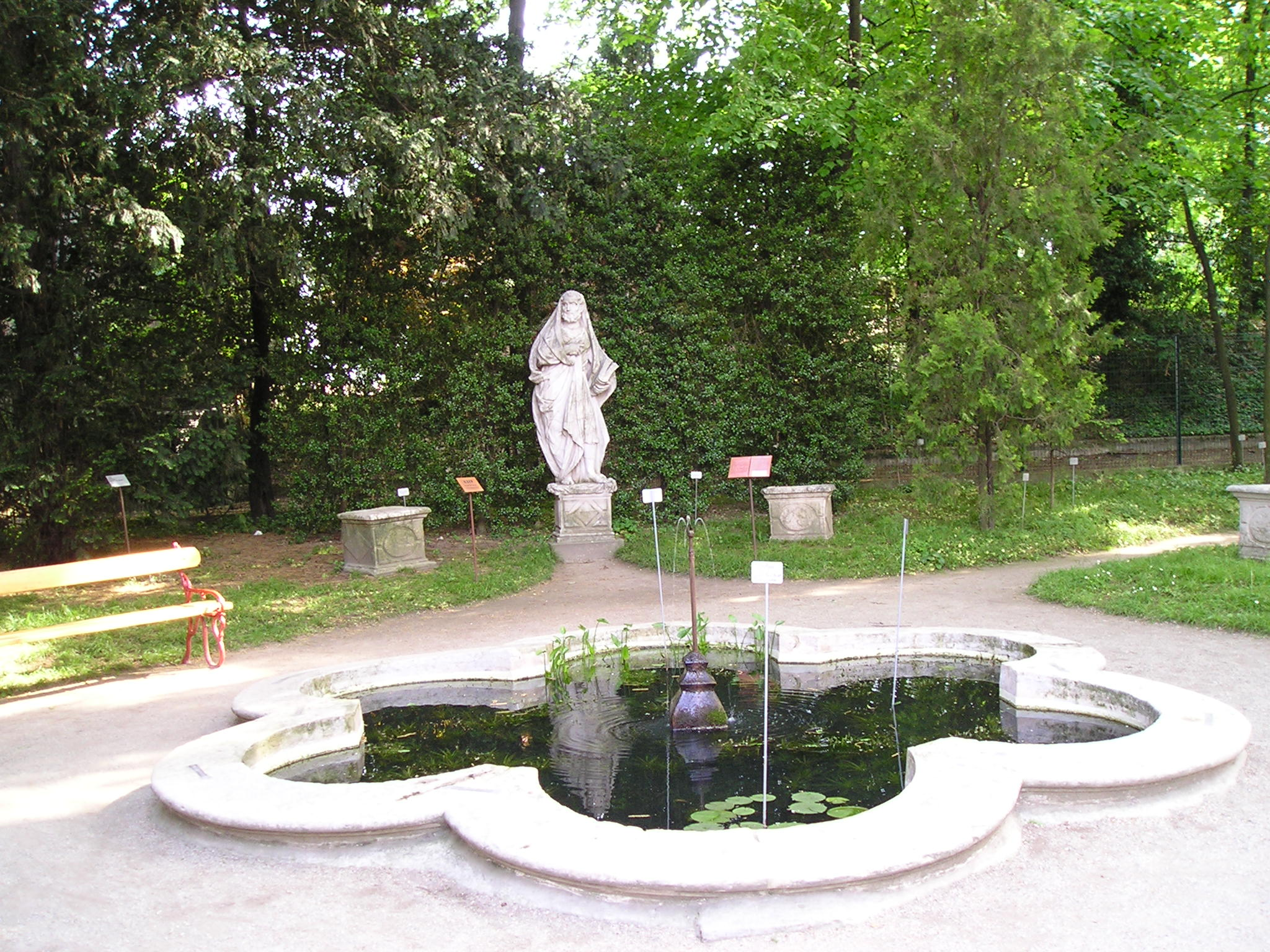 Vèneto: Ła fontana de Teofrasto.